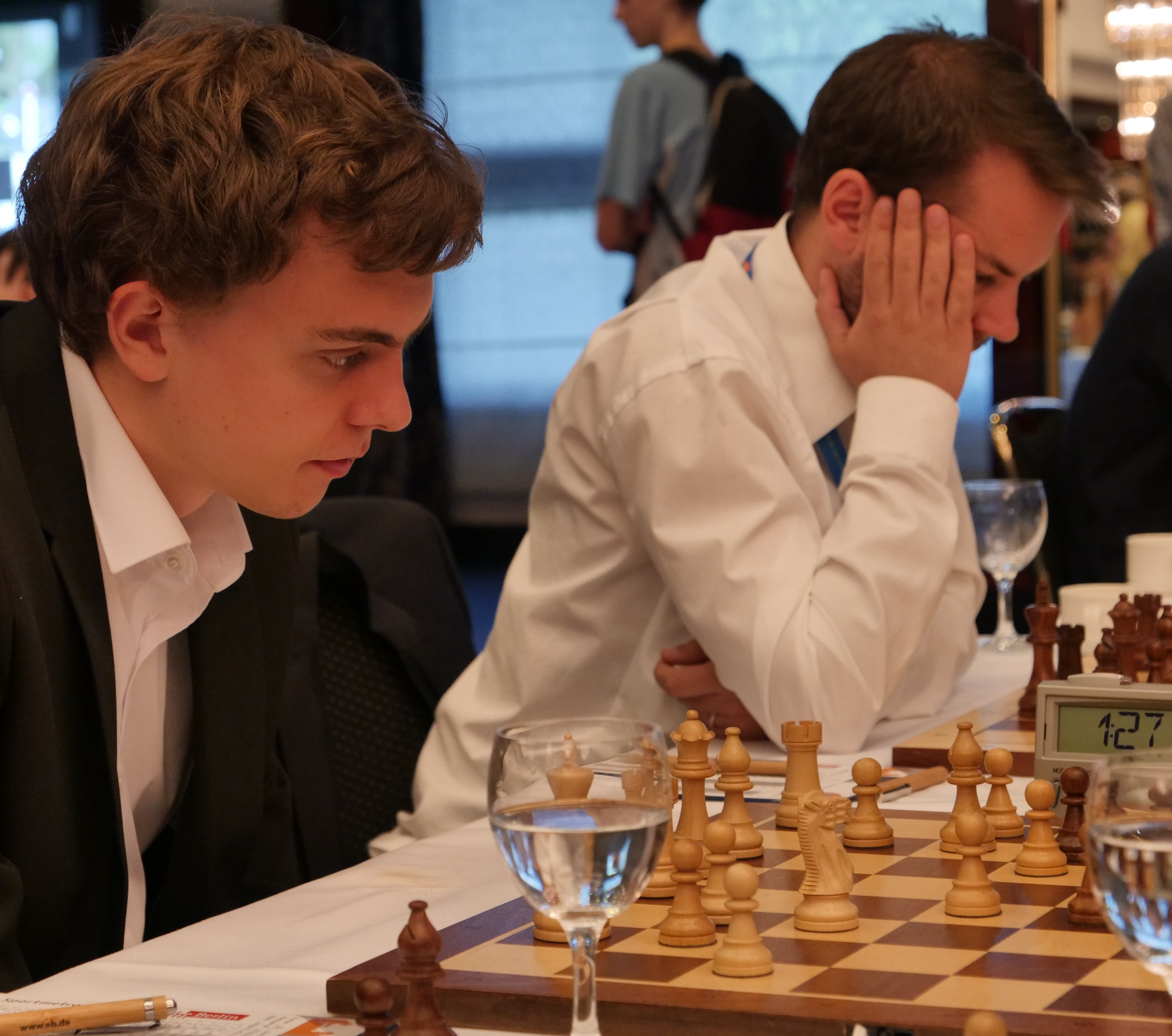 Wagner und Saric Bundesliga-Endrunde 30-4-2018